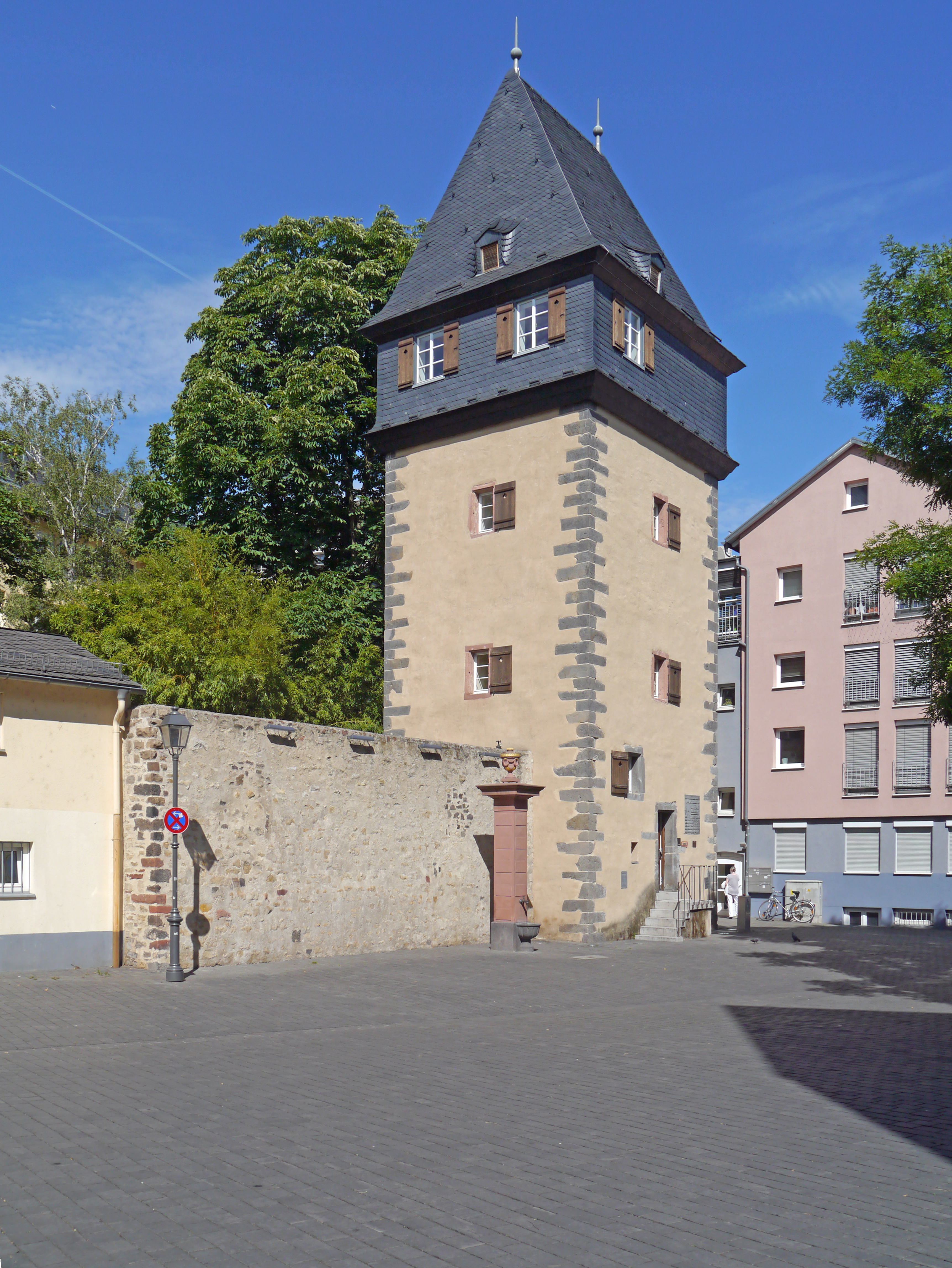 Der Kuhhirtenturm in der Großen Rittergasse, 2017 in Frankfurt-Sachsenhausen.